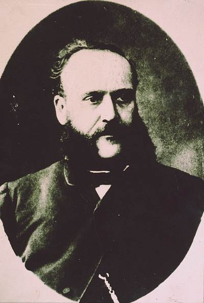 Manuel Demetrio Pizarro